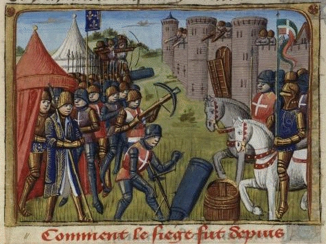 Le Siège de Bayonne, par Martial d'Auvergne, enluminure issue de l'ouvrage Vigiles de Charles VII, Paris, France, XV°siècle.